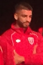 Armando Anastasio durante la presentazione della squadra dell'A.C. Monza nel 2019.